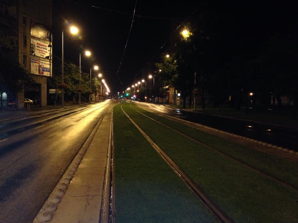 A kőbányai Kőrösi Csoma Sándor út éjszaka (Budapest, X. ker.)